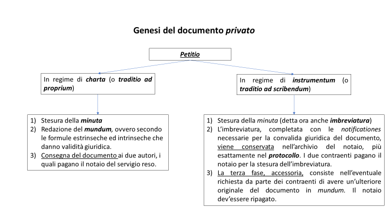 Descrizione della genesi di un documento privato (atto notarile in regime di "traditio ad proprium" e di "traditio ad scribendum") secondo la scienza diplomatistica.